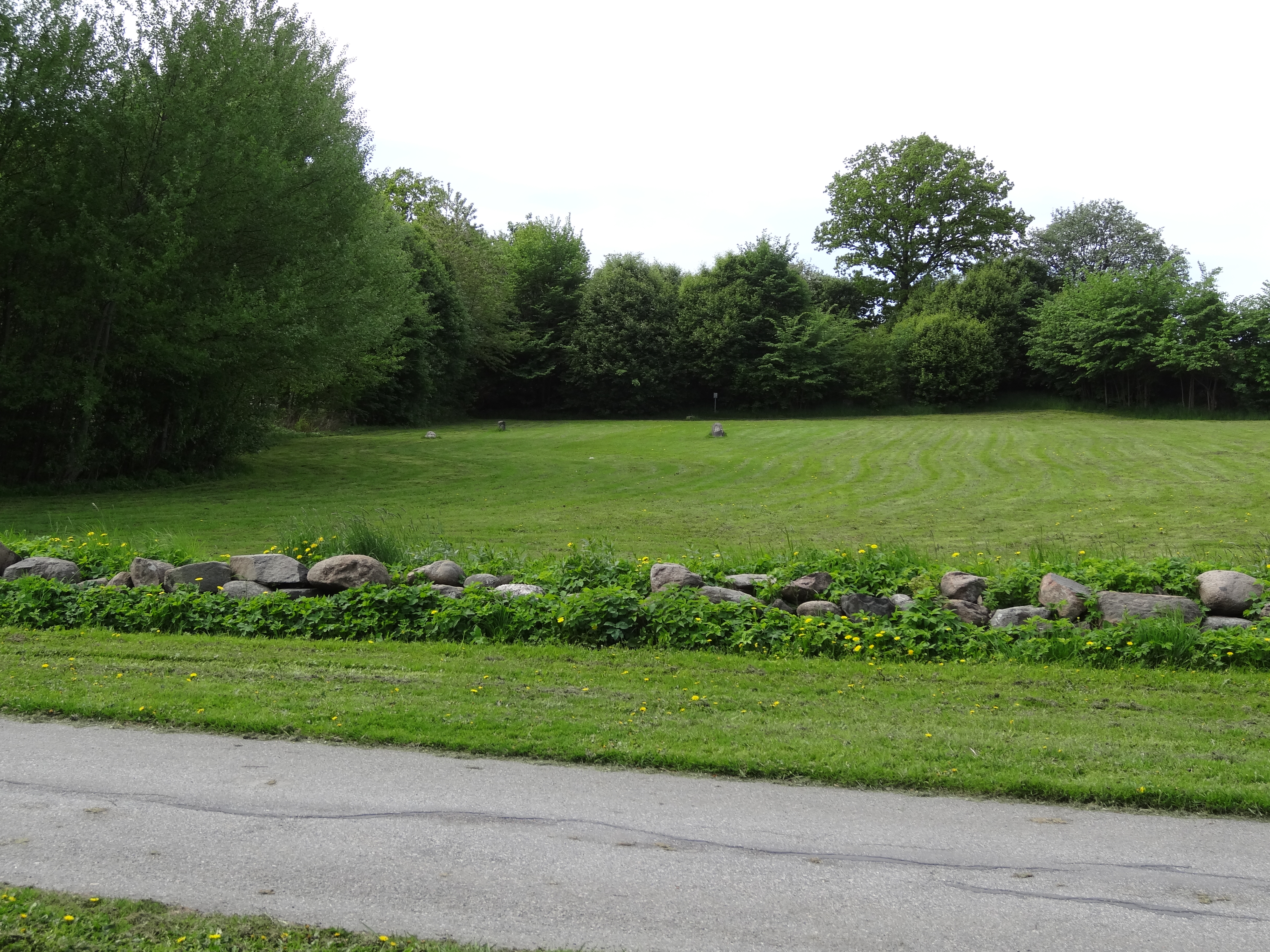 Kolerakyrkogården i Bräcke, RAÄ Lundby 102:1.